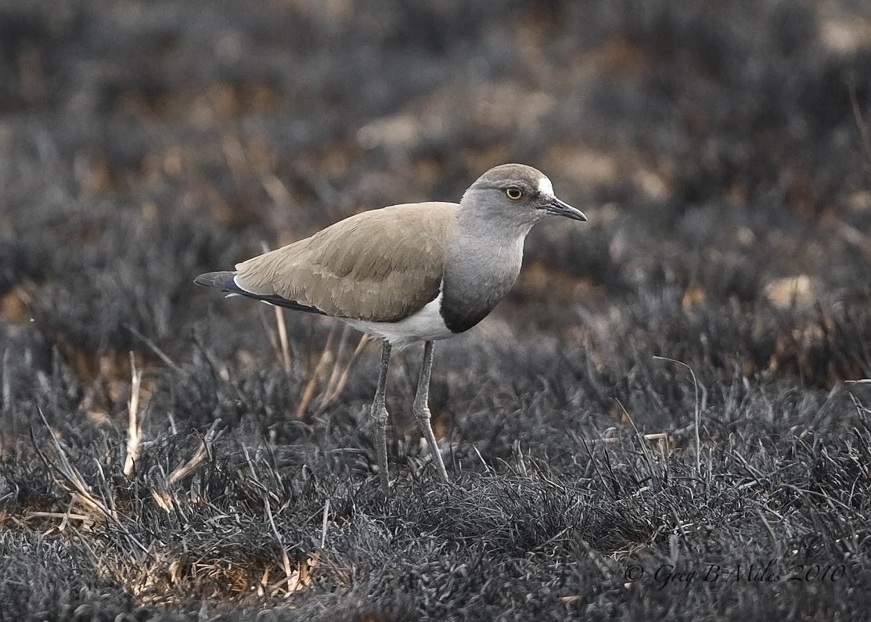 Senegal Lapwing